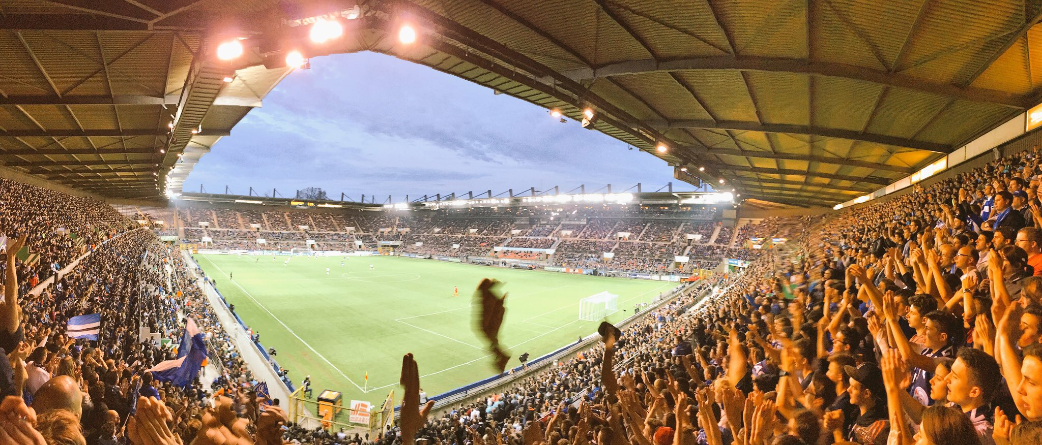 Rencontre RCS-ASC en National